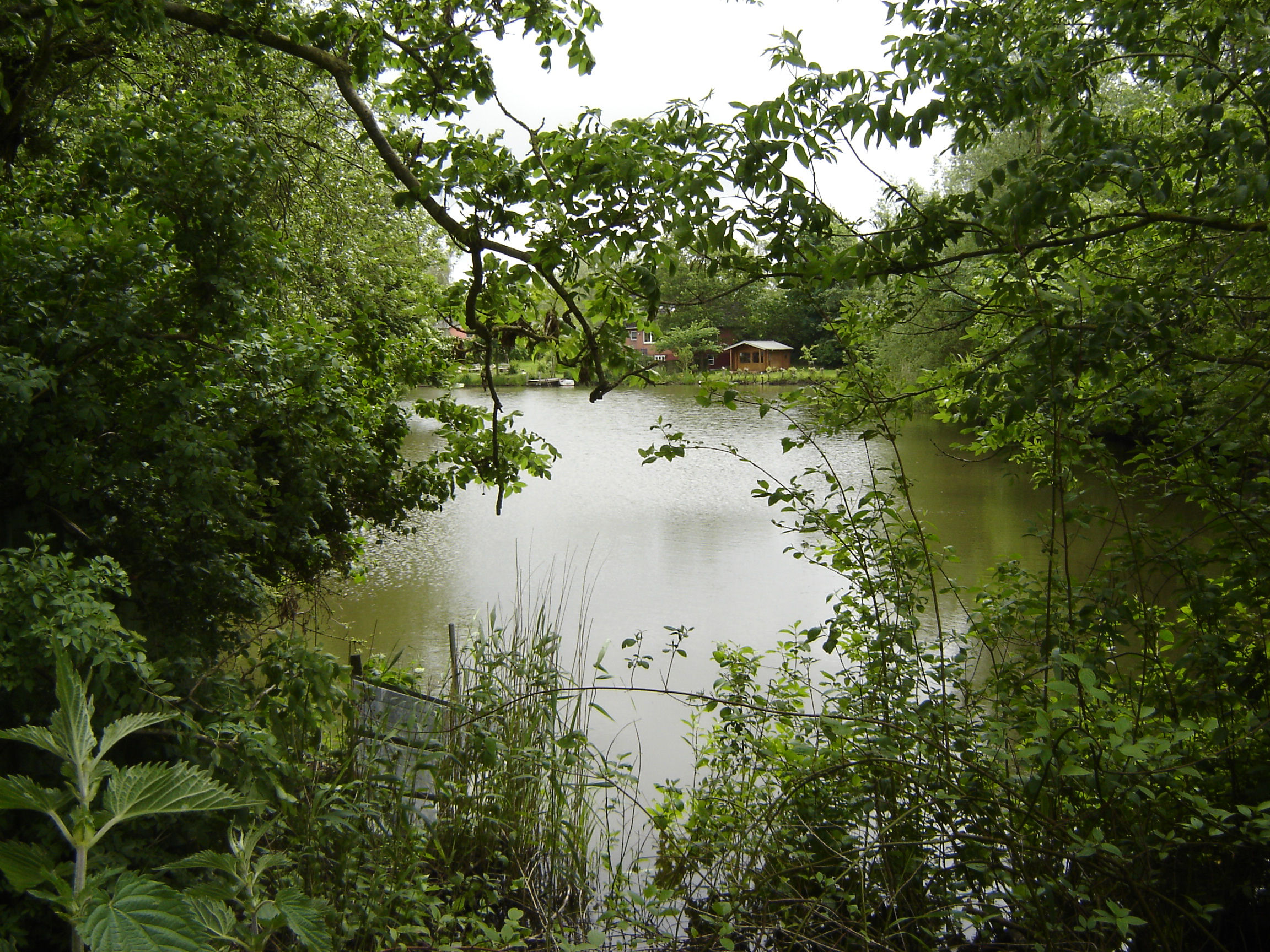 Östliche Wehle am Porrendeich (Uelvesbüll, Kreis Nordfriesland, Schleswig-Holstein, Deutschland).